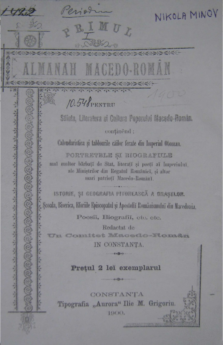 Македонорумънски алманах